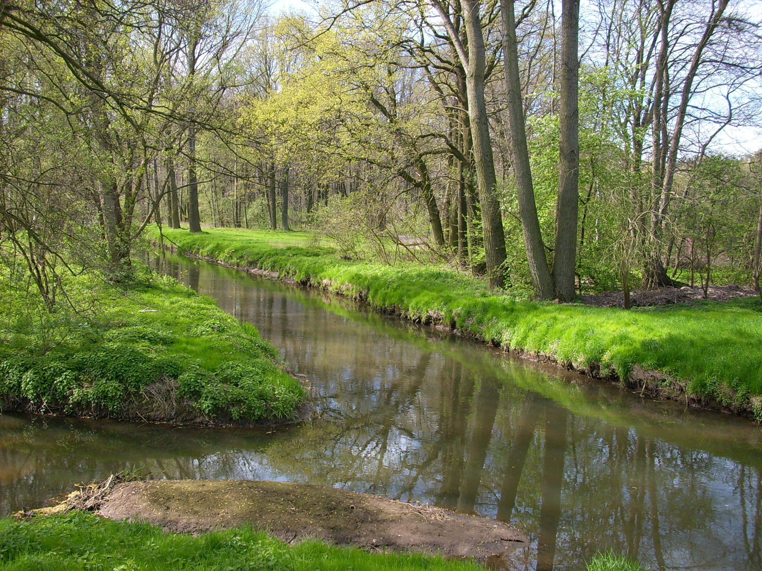 Schwarze Elster bei Hoske, Ortsteil von Wittichenau Hornjoserbsce: Čorny Halštrow pola Hózka